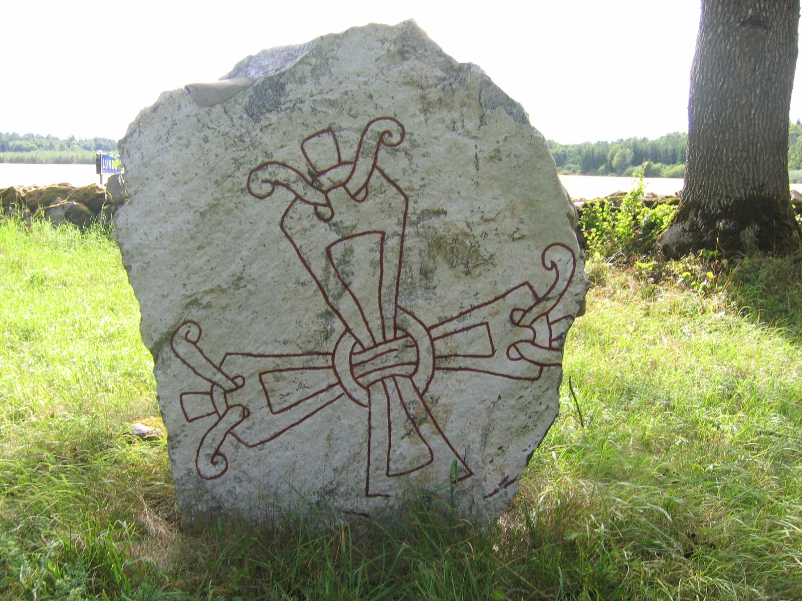 Runestone Vs 2 at Stora Rytterne kyrka, Västerås.